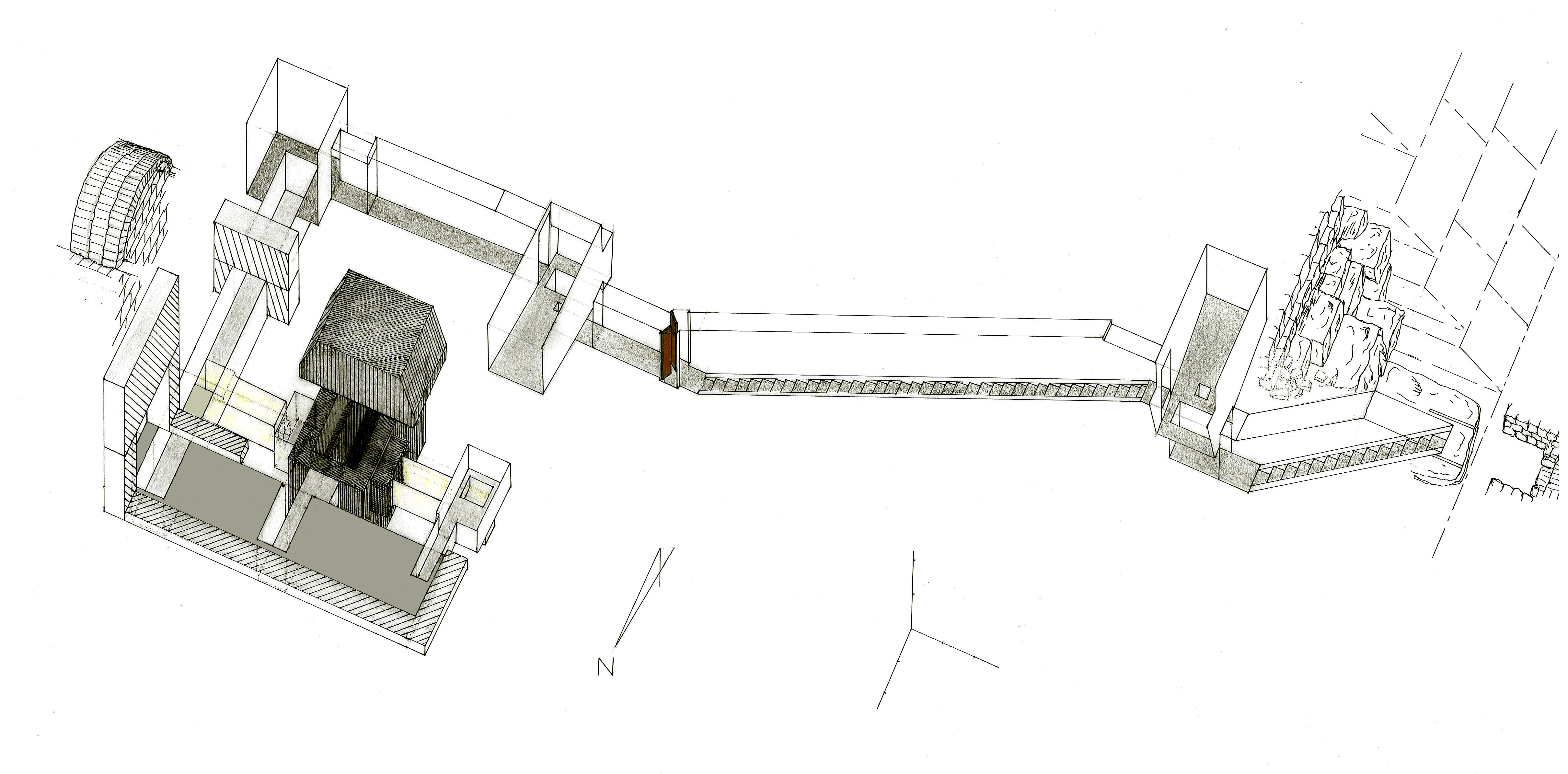 vue des appartements funéraires de la pyramide de Khendjer